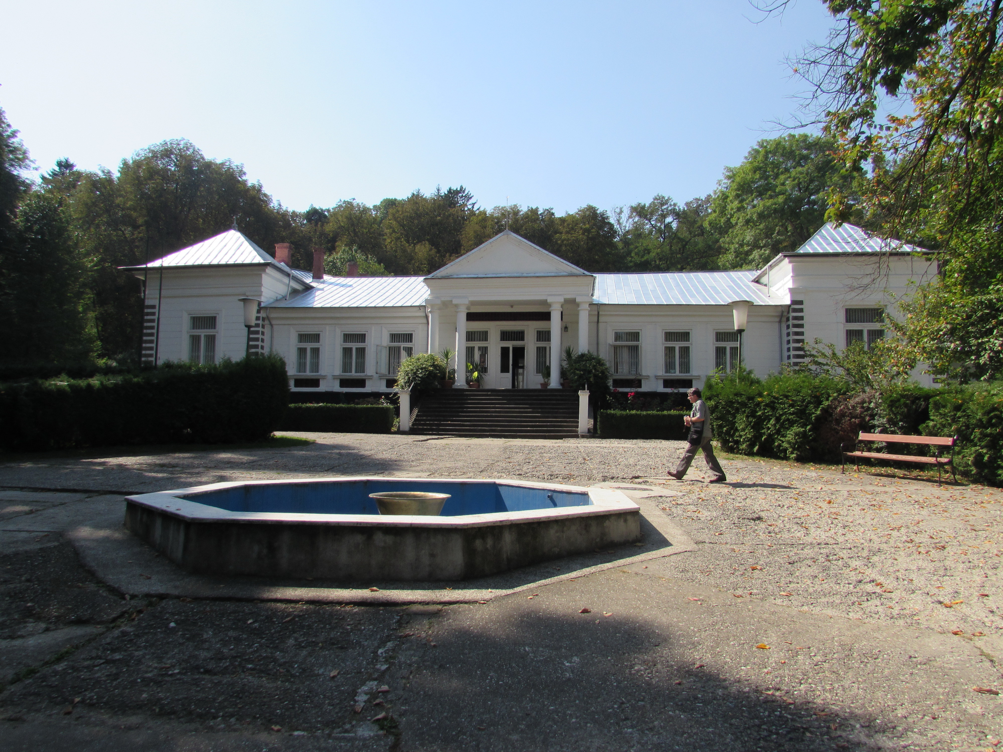 Conacul Rosetti-Tescanu din Tescani 01